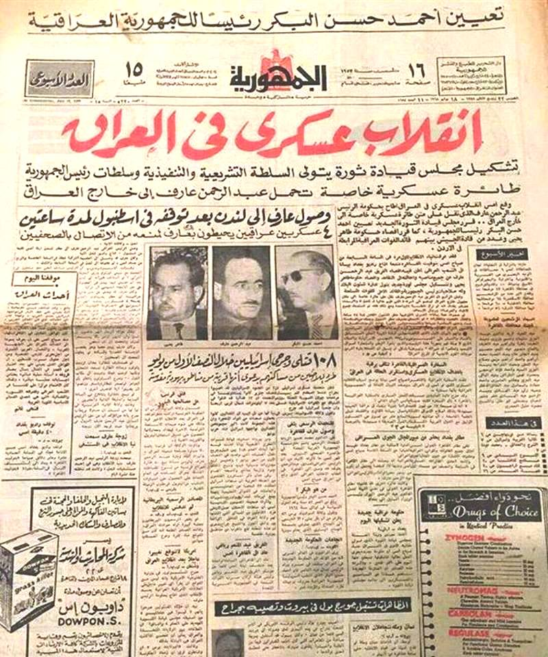 الصفحة الأولى من صحيفة الجمهورية المصرية الصادرة من القاهرة في يوم الخميس الموافق 18 تموز عام 1968 وتعرض فيها أخبار ثورة 17 تموز 1968 في العراق